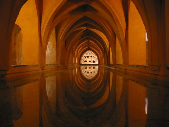 Sevilla Alcazar